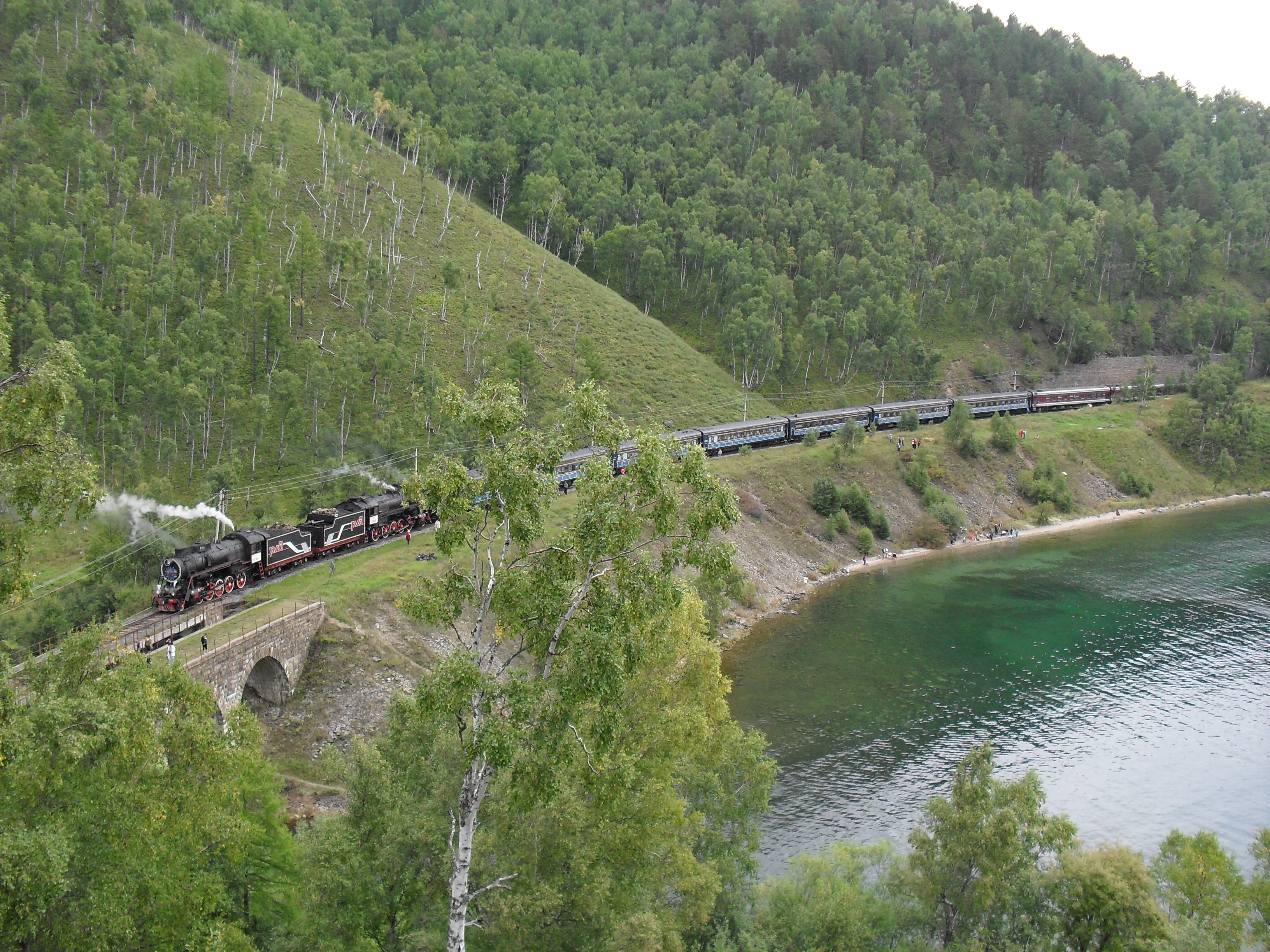 Круго-Байкальская Железная Дорога. Поезд "Байкальский круиз".